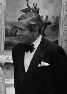 Nationaal Archief Beschrijving: Staatsbezoek Japans Kroonprinselijk paar Prins Akihito Prinses Michiko ; statiefoto op Paleis Soestdijk Datum: 5 oktober 1979 Vervaardiger: Anefo / Suyk Bestanddeelnummer: 930-4824 URL: [1] Voor meer informatie over het Nationaal Archief: Voor meer foto's uit deze en andere collecties, bezoek onze Beeldbank:, U kunt ons helpen onze kennis van de fotocollecties te verrijken door tags en commentaren toe te voegen. Herkent u mensen of locaties of heeft u een bijzonder verhaal te vertellen bij één van de foto's, laat dan een reactie achter (als u ingelogd bent bij Flickr) of stuur een mailtje naar